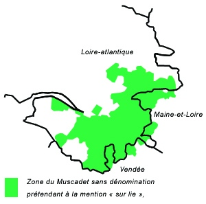 Zone Muscadet sans dénomination et prétendant à la mention « sur lie »